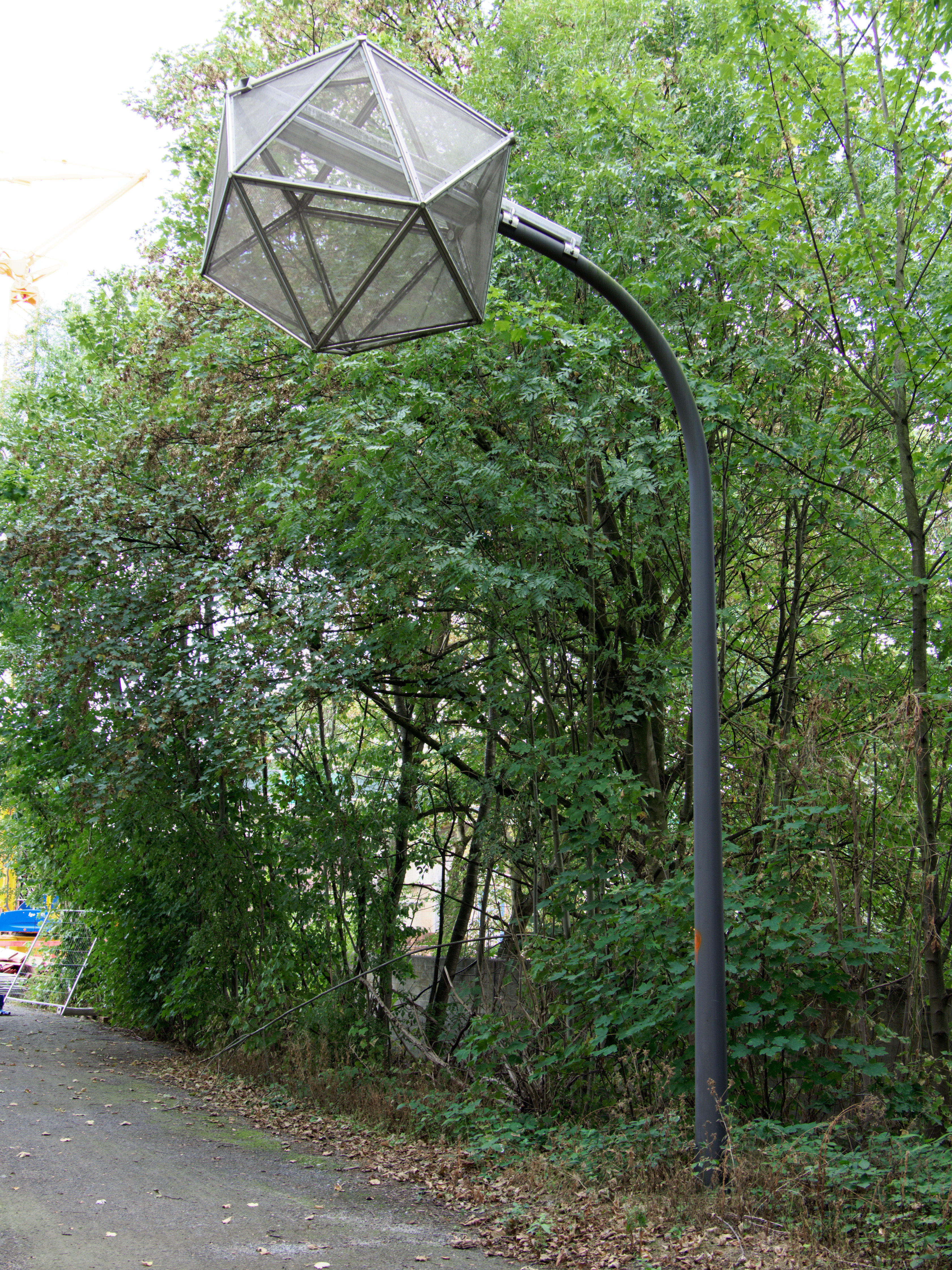 Mückenhäuser, ein Werk von Michael Sailstorfer, ausgewählt für die künstlerische Gestaltung des Radweges auf der ehemaligen Zechenbahntrasse Blumenthal zwiscehn Stuckenbusch (Friedrich-Ebert-Straße) und der Herner Straße.